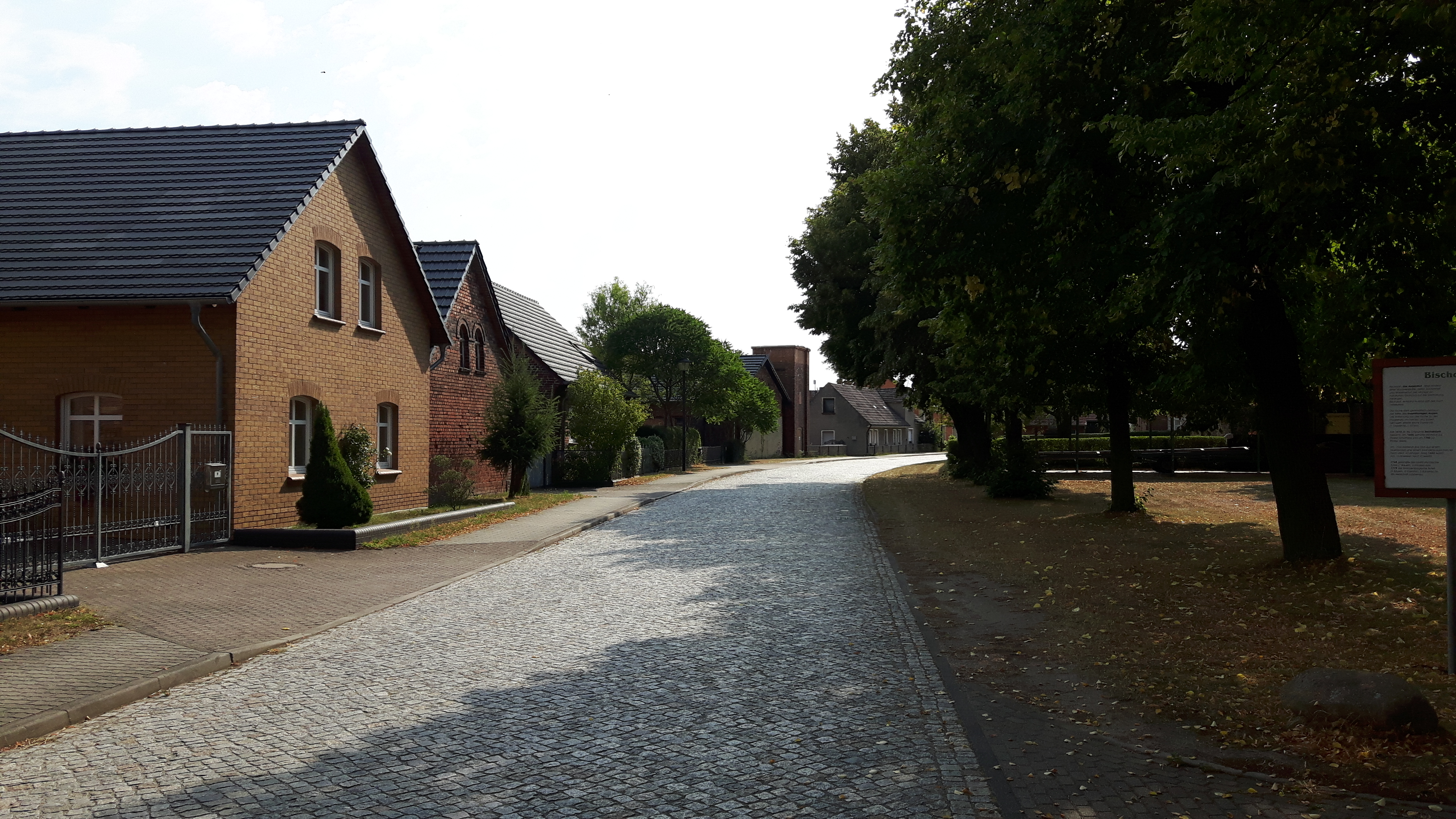 Die Bischdorfer Hauptstraße in Bischdorf, einem Ortsteil der Stadt Lübbenau/Spreewald in Brandenburg.